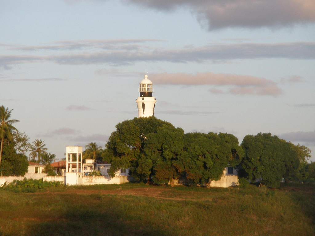 Farol de Maceió, em Maceió, Alagoas, Brasil